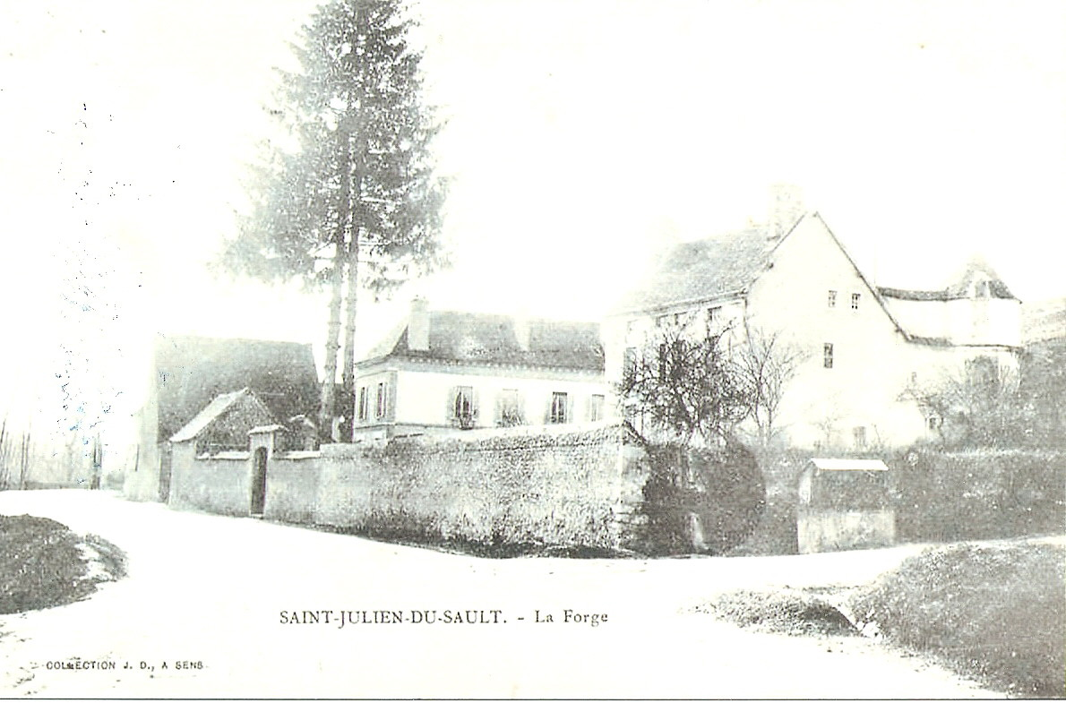 La forge de Saint-Julien-du-Sault (Yonne) France